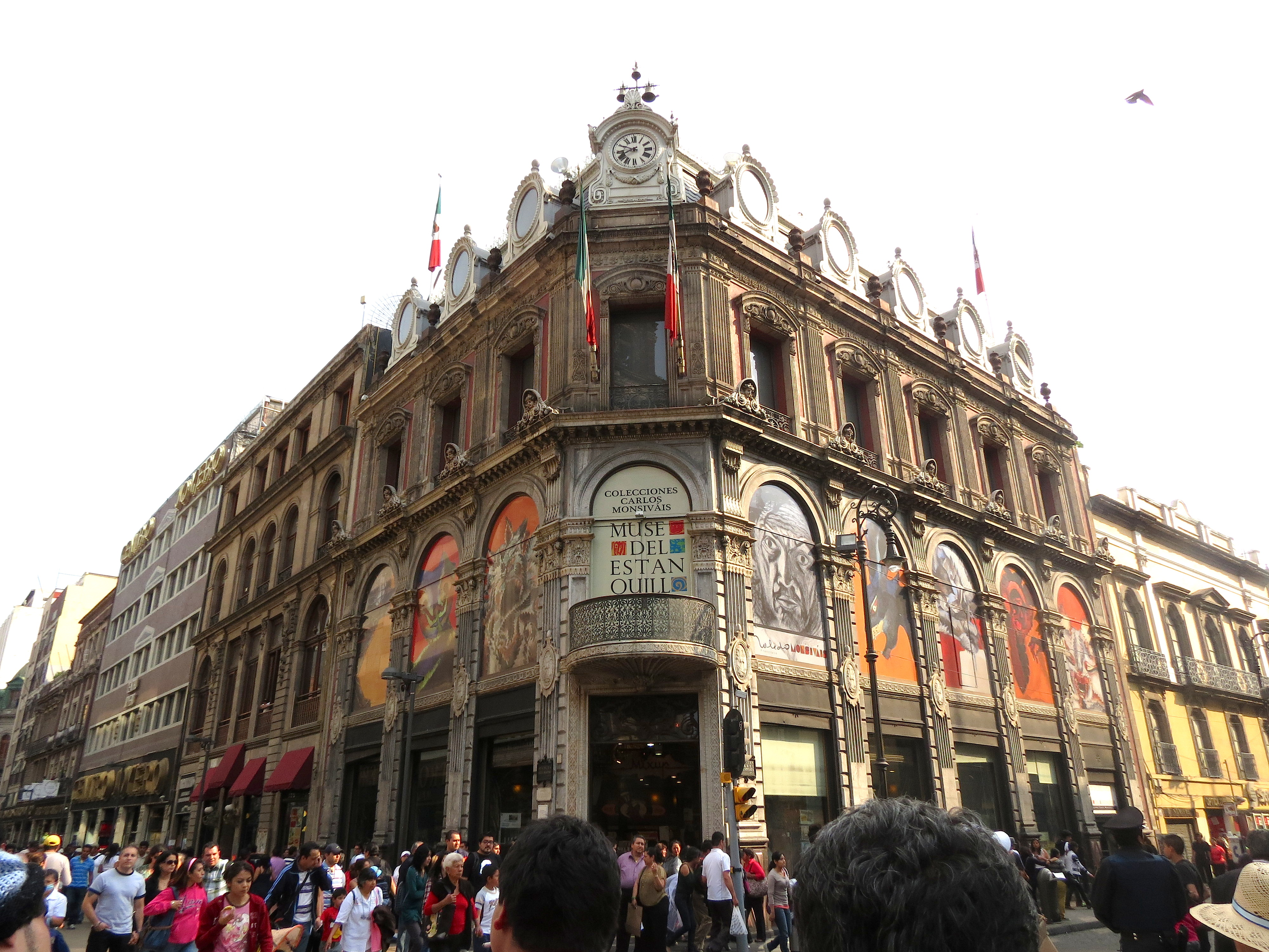 Fachada del Museo El Estanquillo